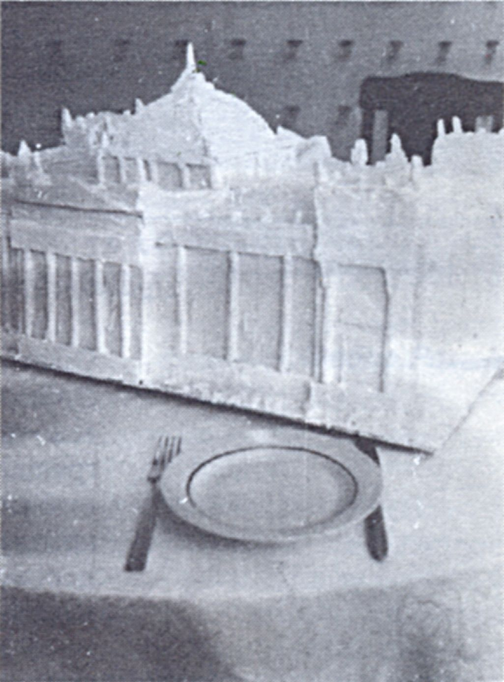 Installation art "Dva prinosheniya: gorkoe i sladkoe". A. Kislyakov, Y. Shabelnikov.